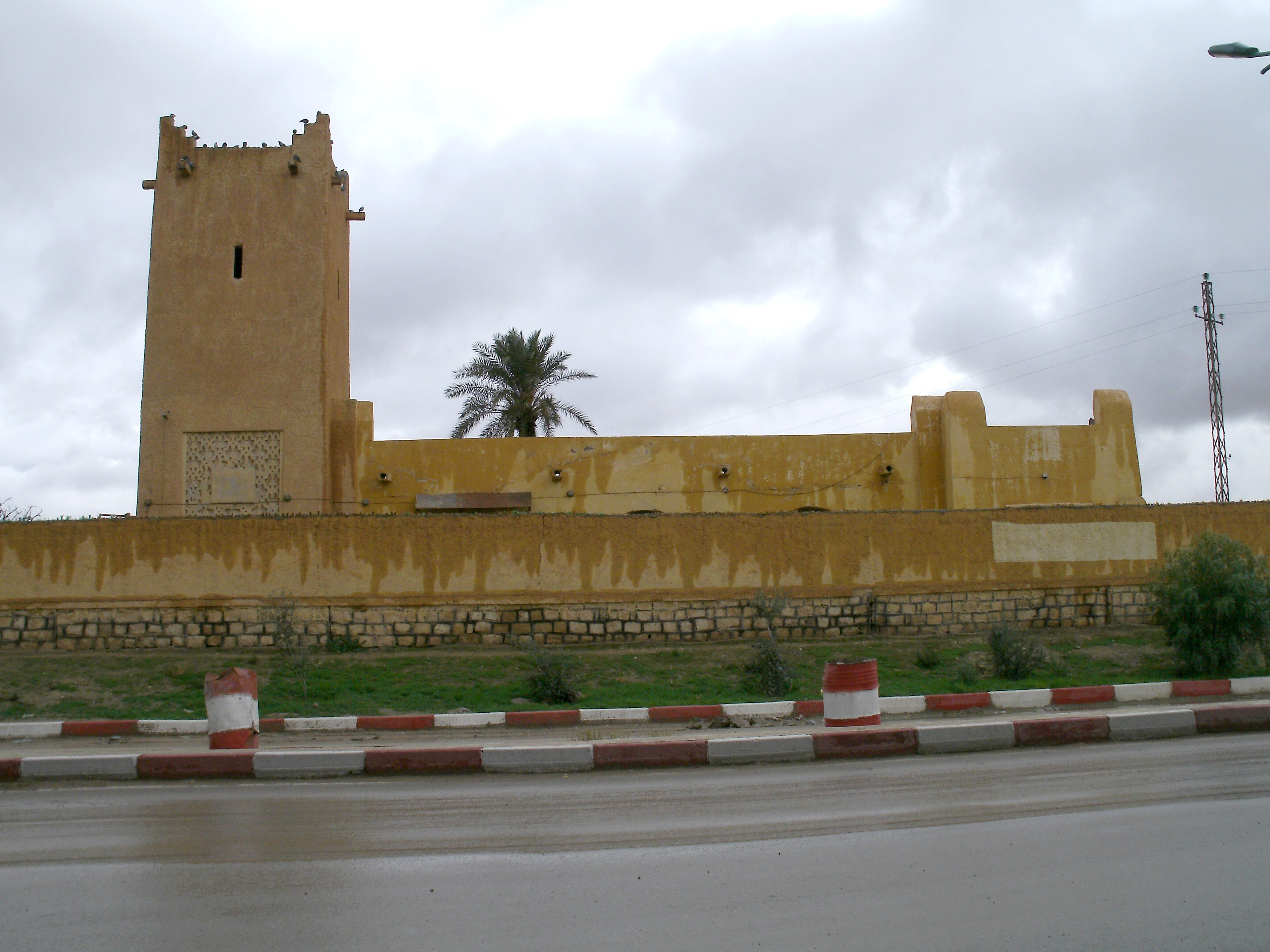 L'ancien Bordj Welvert au croisement des rocades à Aïn el Hadjel